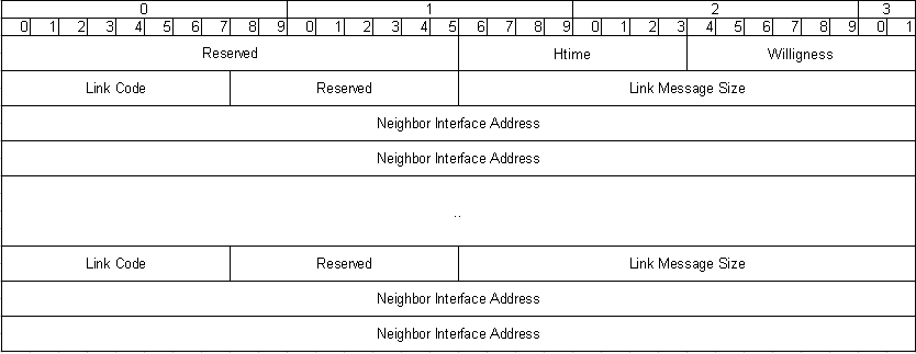 OLSR_paquet_hello Source Création personelle